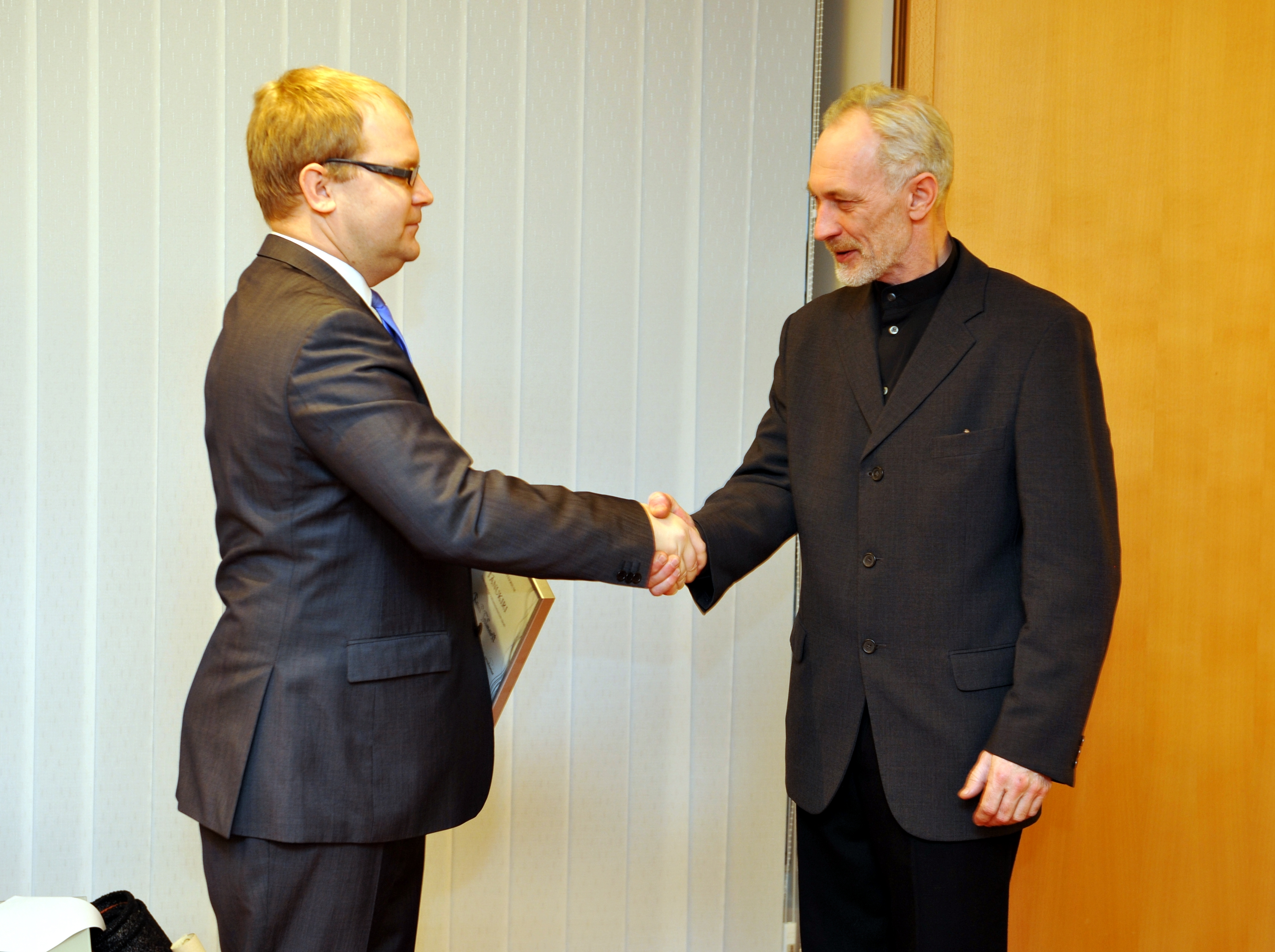 Välisministrer tunnustas noorte laulu- ja tantsupeo loovmeeskonna liikmeid Veronika Portsmuthi, Märt Agu, Raul Talmarit ja Aet Maateed.